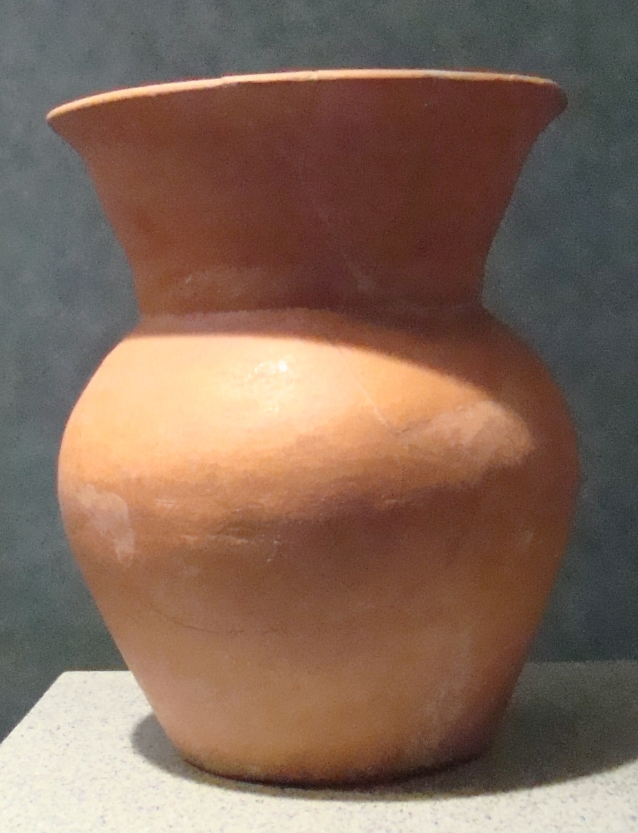 Vasija del tipo Anaranjado Delgado, hallada en Teotihuacan (México). Forma parte de la colección del Museo Nacional de Antropología.